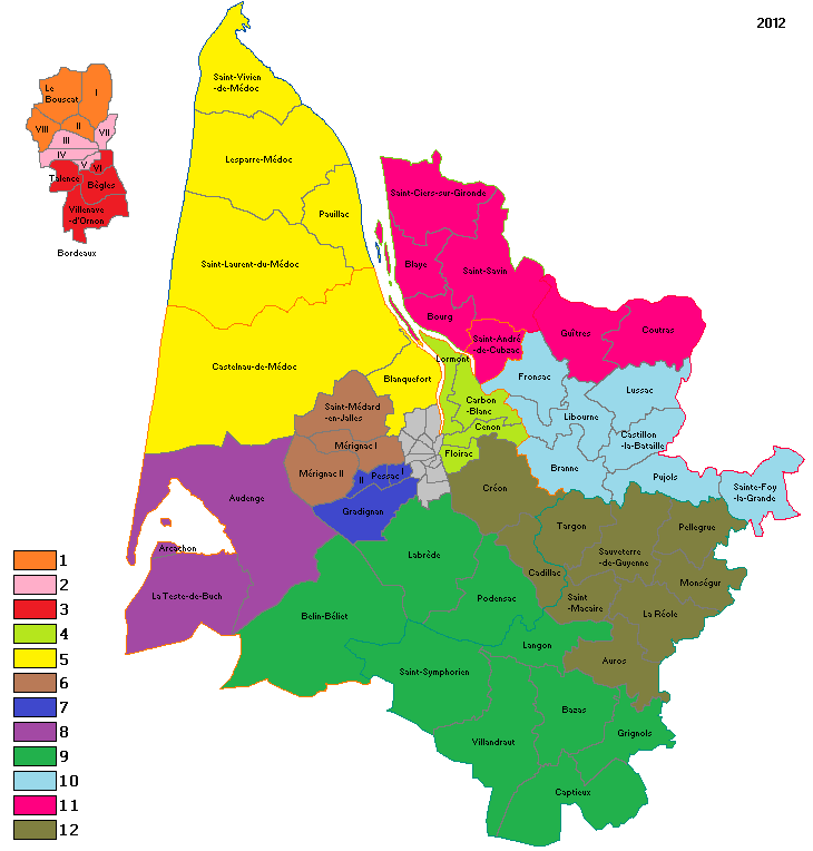 Circonscriptions de la Gironde en 2012